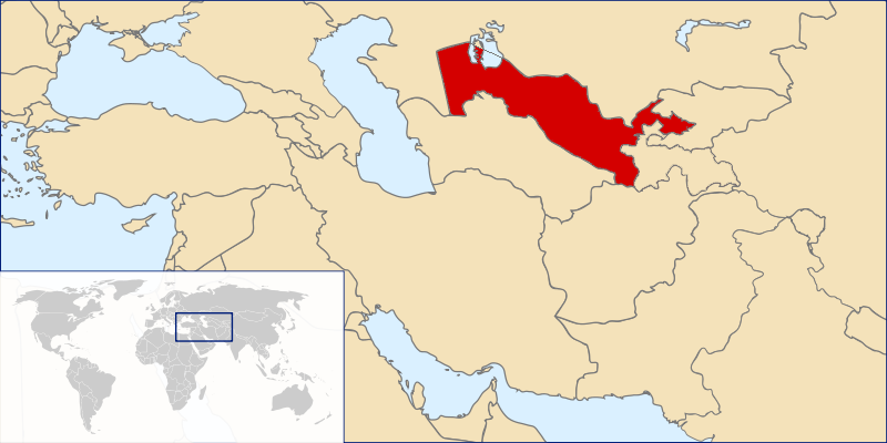 (en) World Map (pt) Mapa Mundo (de) Weltkarte (sv) Världskarta (es) Mapamundi